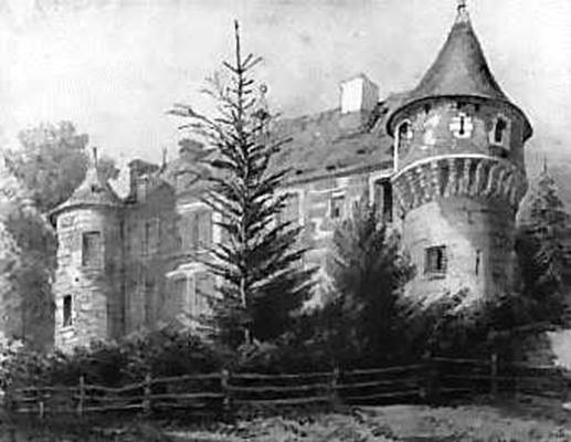 Château de Houlbec près le Gros-Theil